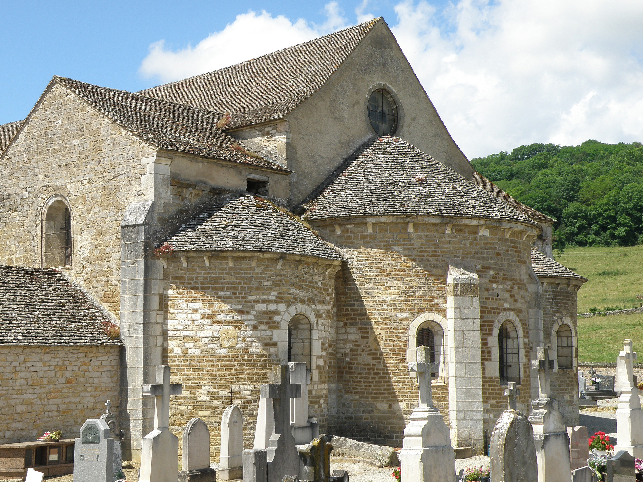 La Rochepot (Côte-d’Or, Bourgogne, France). Église Saint-Georges.